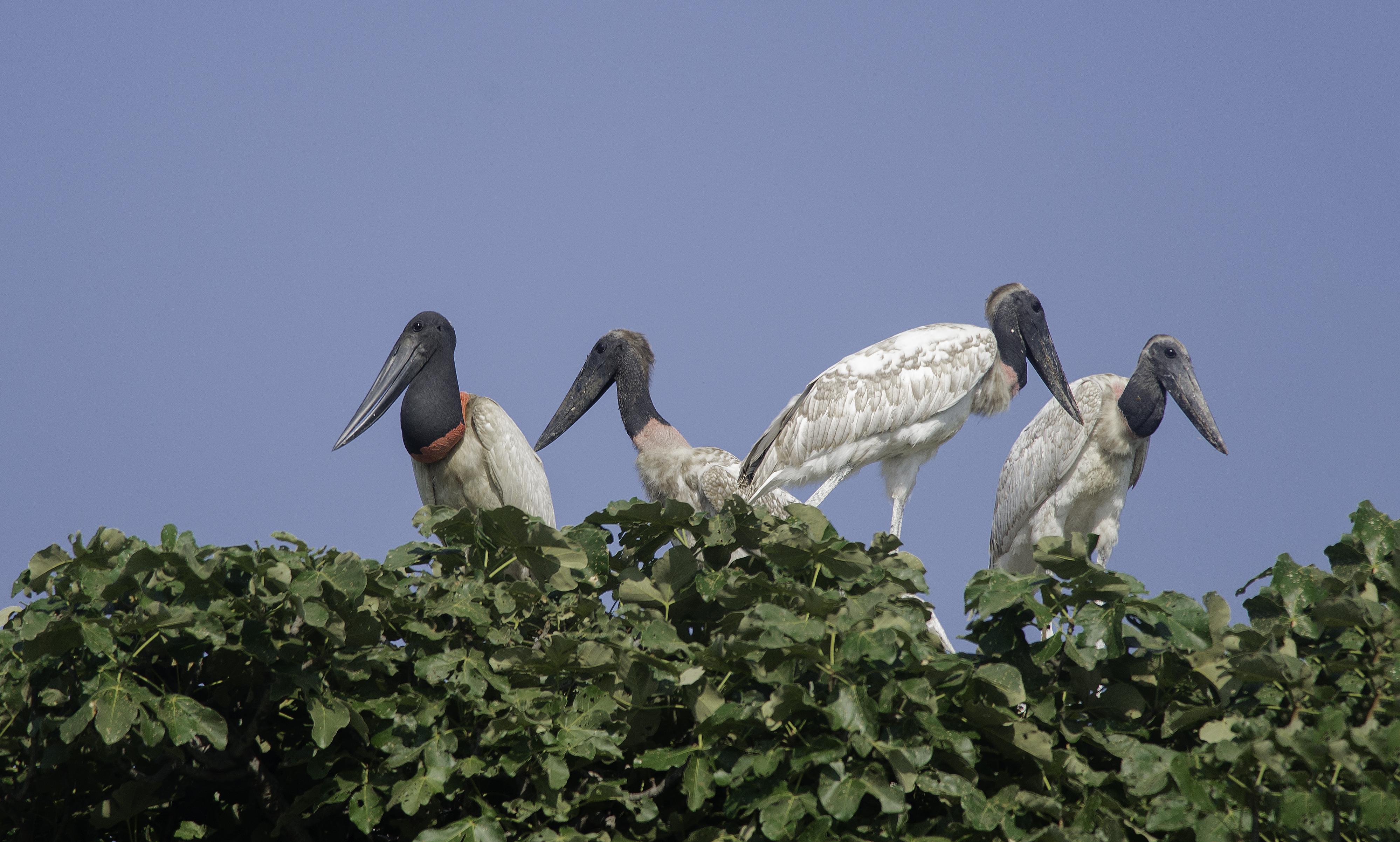 família reunida